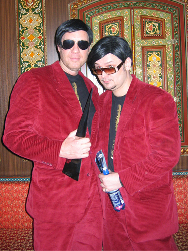 The Discoboys bei der Dance Music Award Verleihung 2005 in Hannover